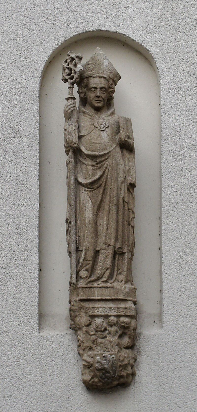 Kopia figury św. Ottona z Bambergu - Zamek Książąt Pomorskich w Szczecinie